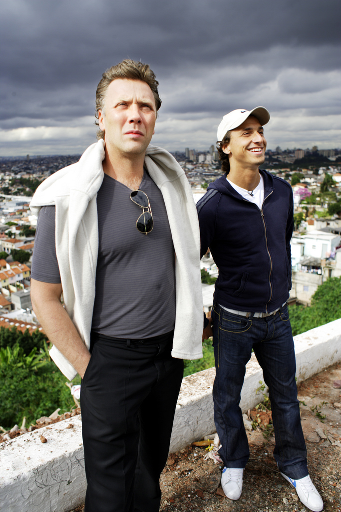 Inför TV-galan 2006 besökte Mikael Persbrandt och Zlatan Ibrahimovic UNICEF-projekt i Brasilien. Copyright/Foto: Melker Dahlstrand/UNICEF.